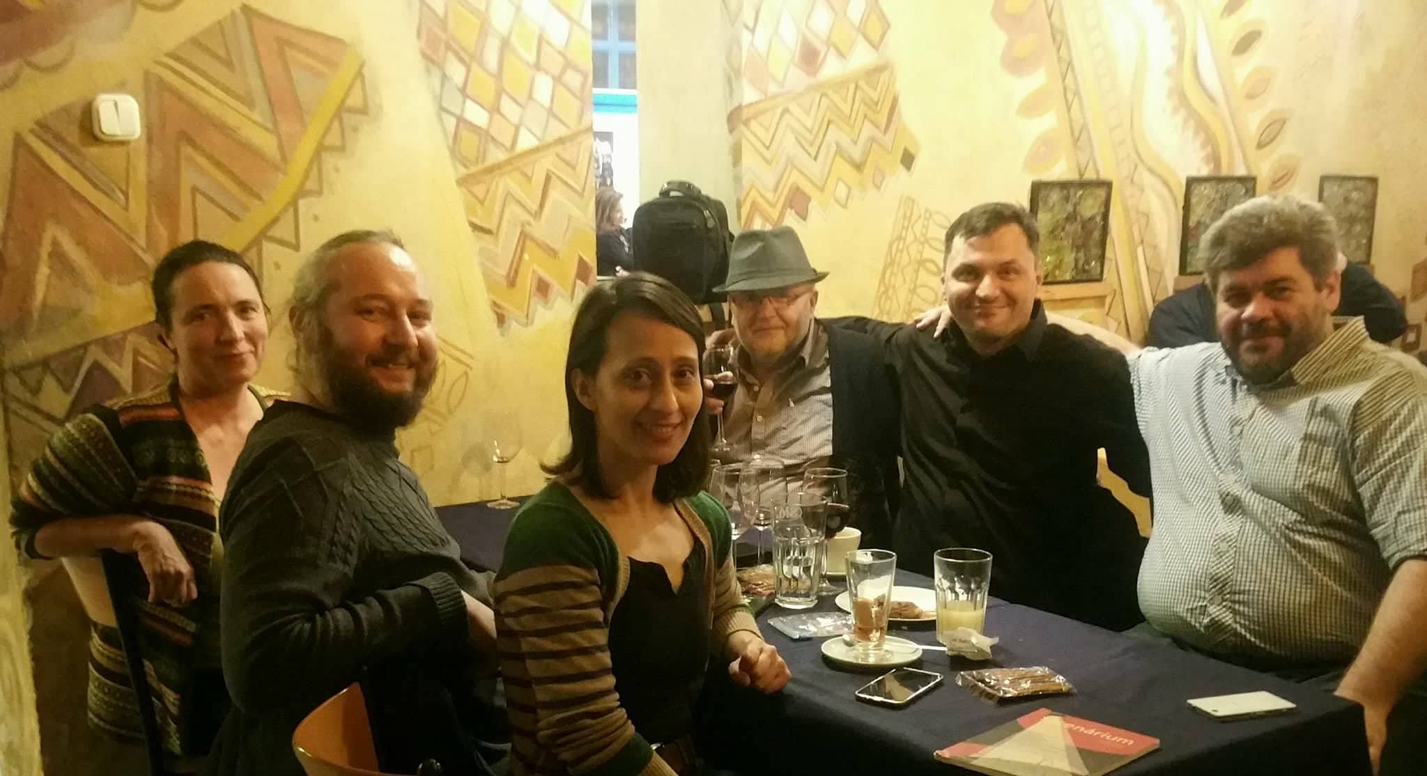 Folkrádiósok a Fonó Budai Zeneházban; Zagyva Natália, Auth Gábor, Biri Elvira, Boskó András, Kemecsei Gábor, Káplár Tamás